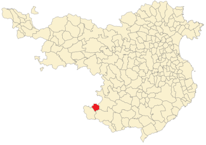 Situación de Espinelves en la provincia de Gerona.